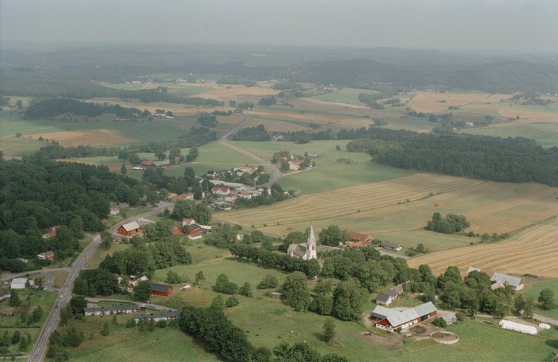 Köinge kyrka, Ätradalen. Bilden är tagen mot (väderstreck): NO Motiv: Köinge Nyckelord: Flygbilder, Riksintressen Kategori: Dalgångsbygd, Kyrkomiljö Köinge kyrka, Ätradalen. Bilden är tagen mot (väderstreck): NO. Länsväg 154 passerar nordväst om kyrkan.